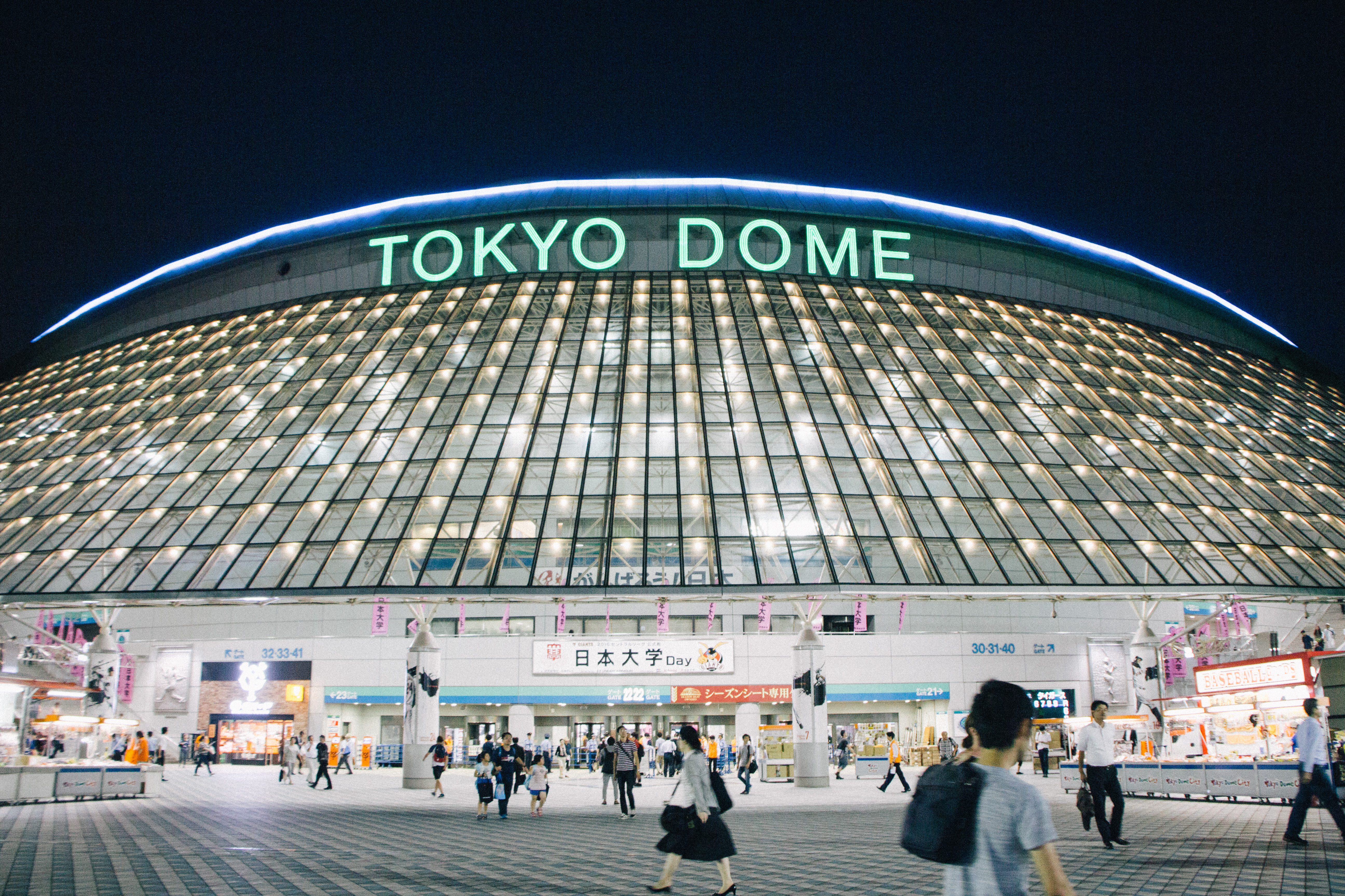 東京ドーム